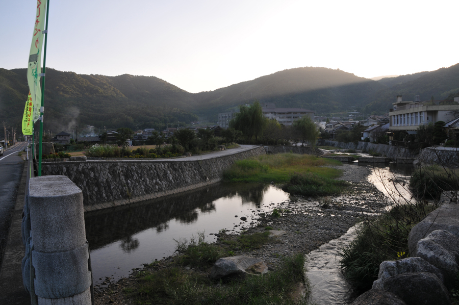 湯野温泉、夜市川